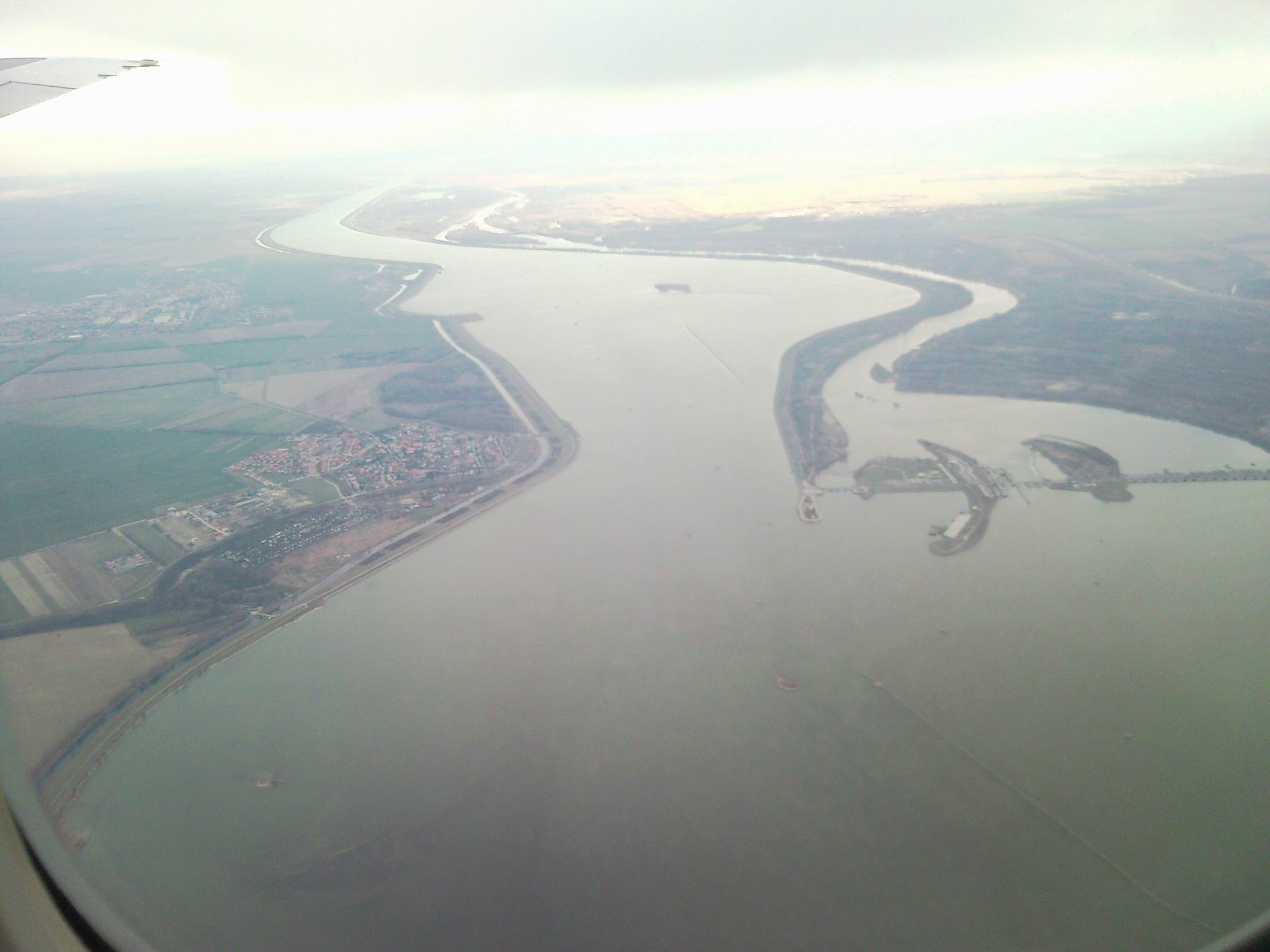 931 01 Šamorín, Slovakia